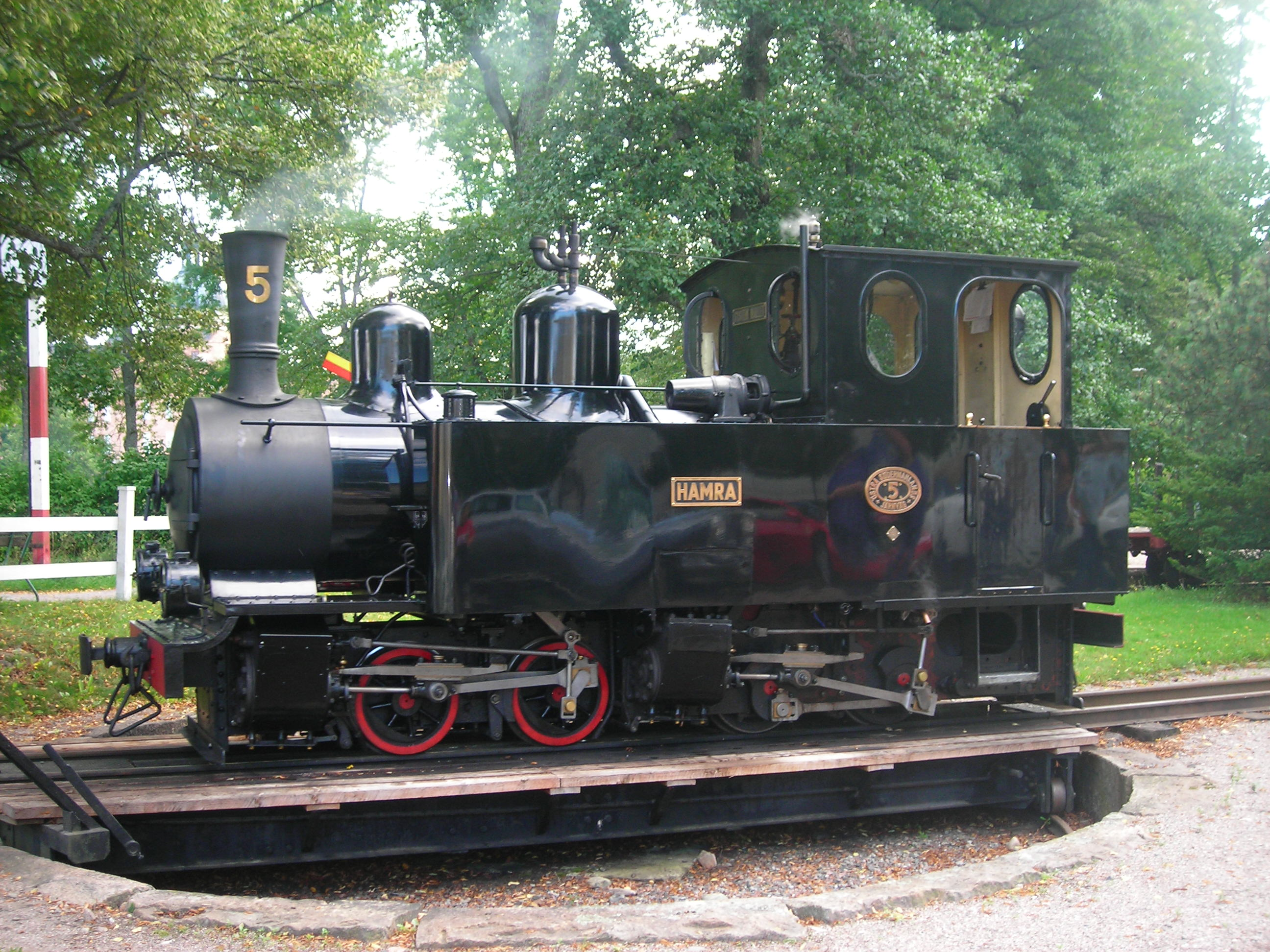 Foto: Daniel S.